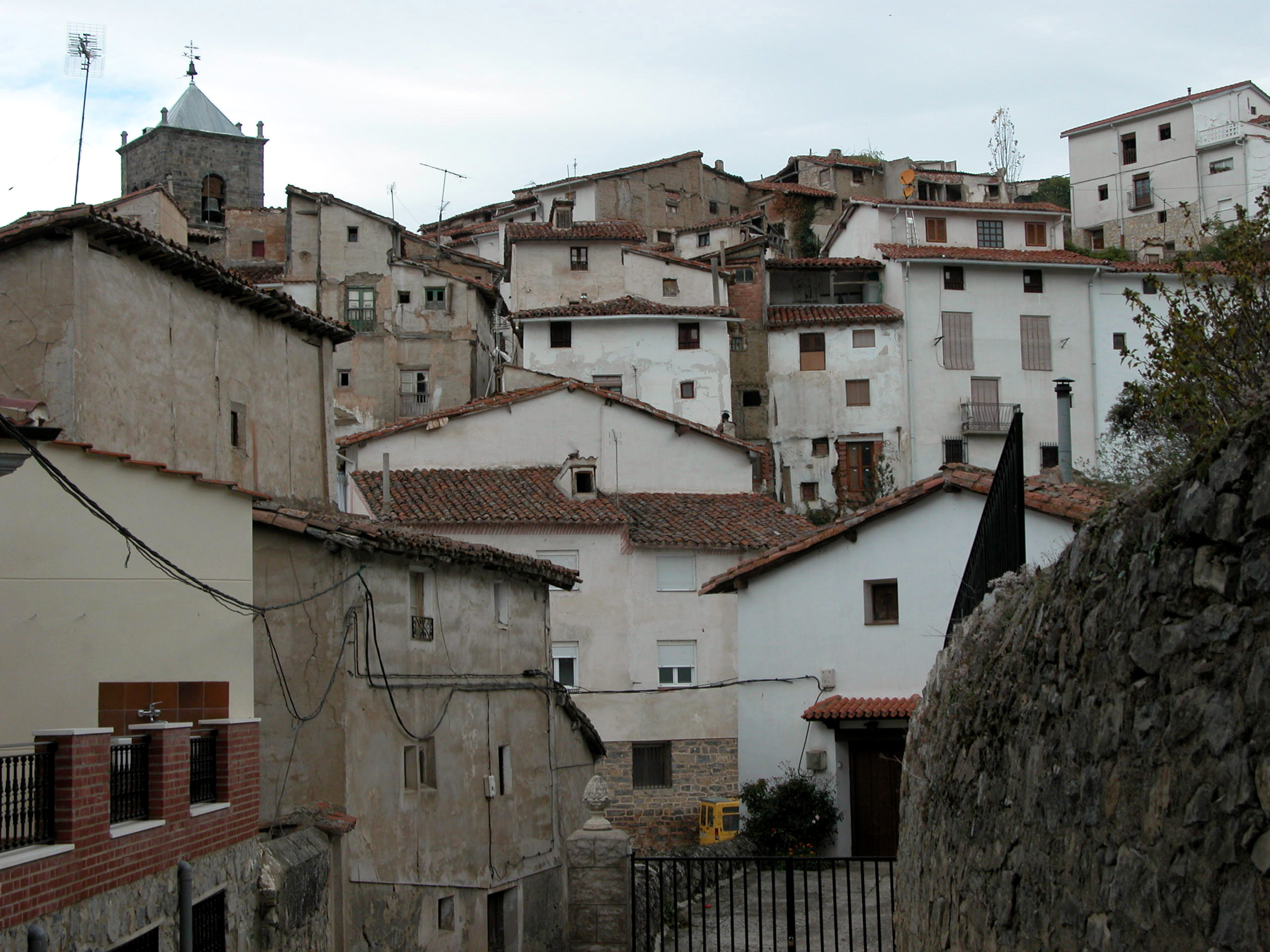 Munilla, La Rioja - España.